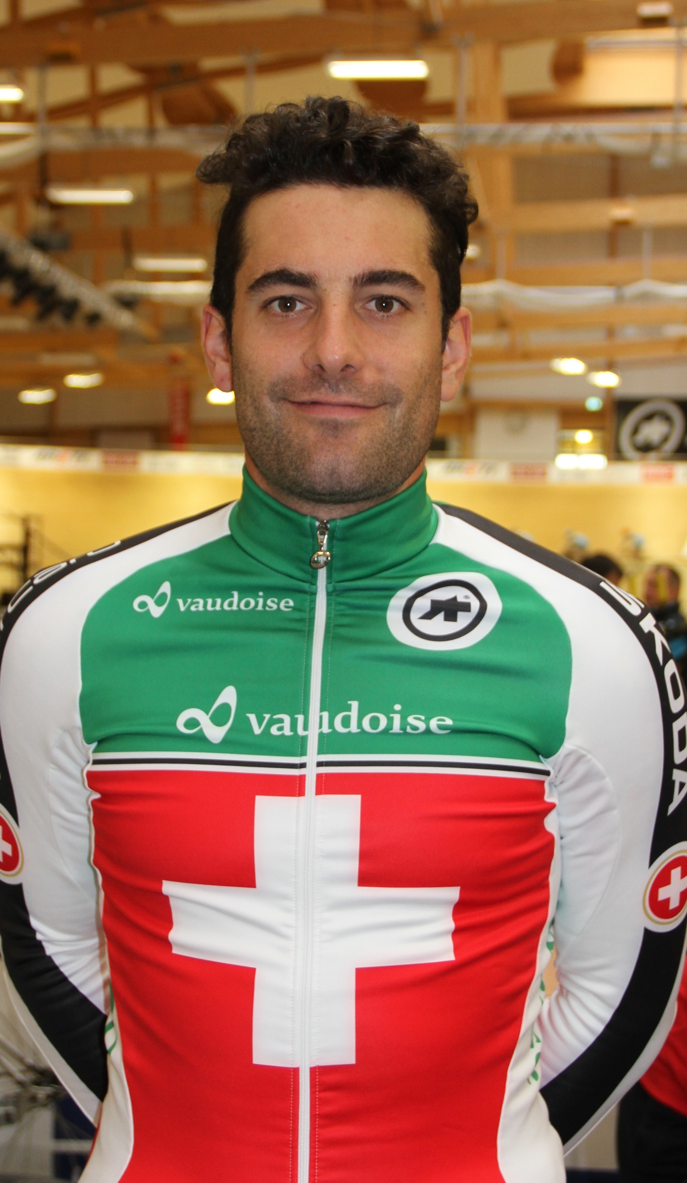 Tristan Marguet, Schweizer Radsportler The making of this document was supported by the Community-Budget of Wikimedia Germany.